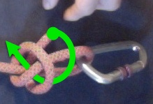 Noeud double ganse nouage